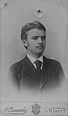 Дмитрий Владимирович Антоно́вич (1877—1945) — украинский общественно-политический, государственный и культурный деятель, историк искусства.